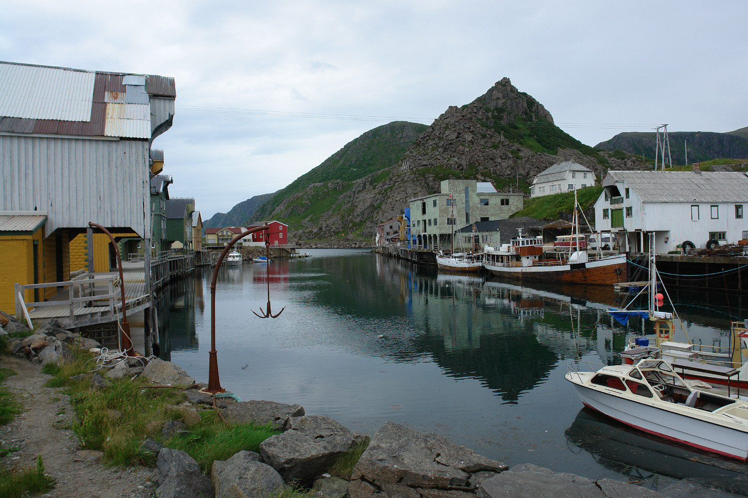 Fischerdorf Nyksund auf den Vesterålen in Norwegen